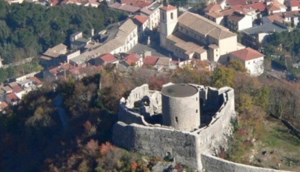 Il Castello del Monte in primo piano. In secondo piano, a destra Santa MAria del PIano e a sinistra Villa Abiosi.